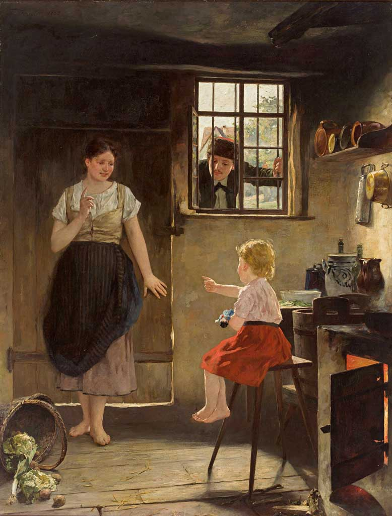 Kleinkind verrät die große Schwester, die sich vor dem durch das Fenster blickenden Verehrer hinter der Türe verbirgt. Öl auf Leinwand. 112 x 86 cm. Signiert und 1892 datiert.